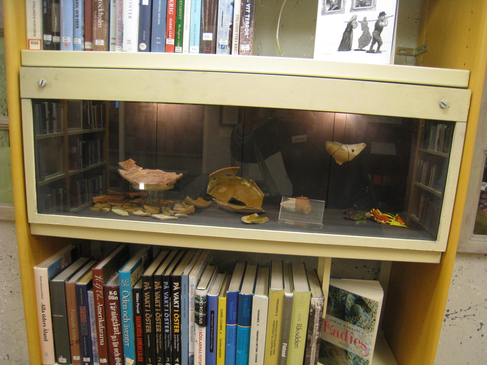 Koffsanmuseet på Jakobsbergs bibliotek i Järfälla kommun.